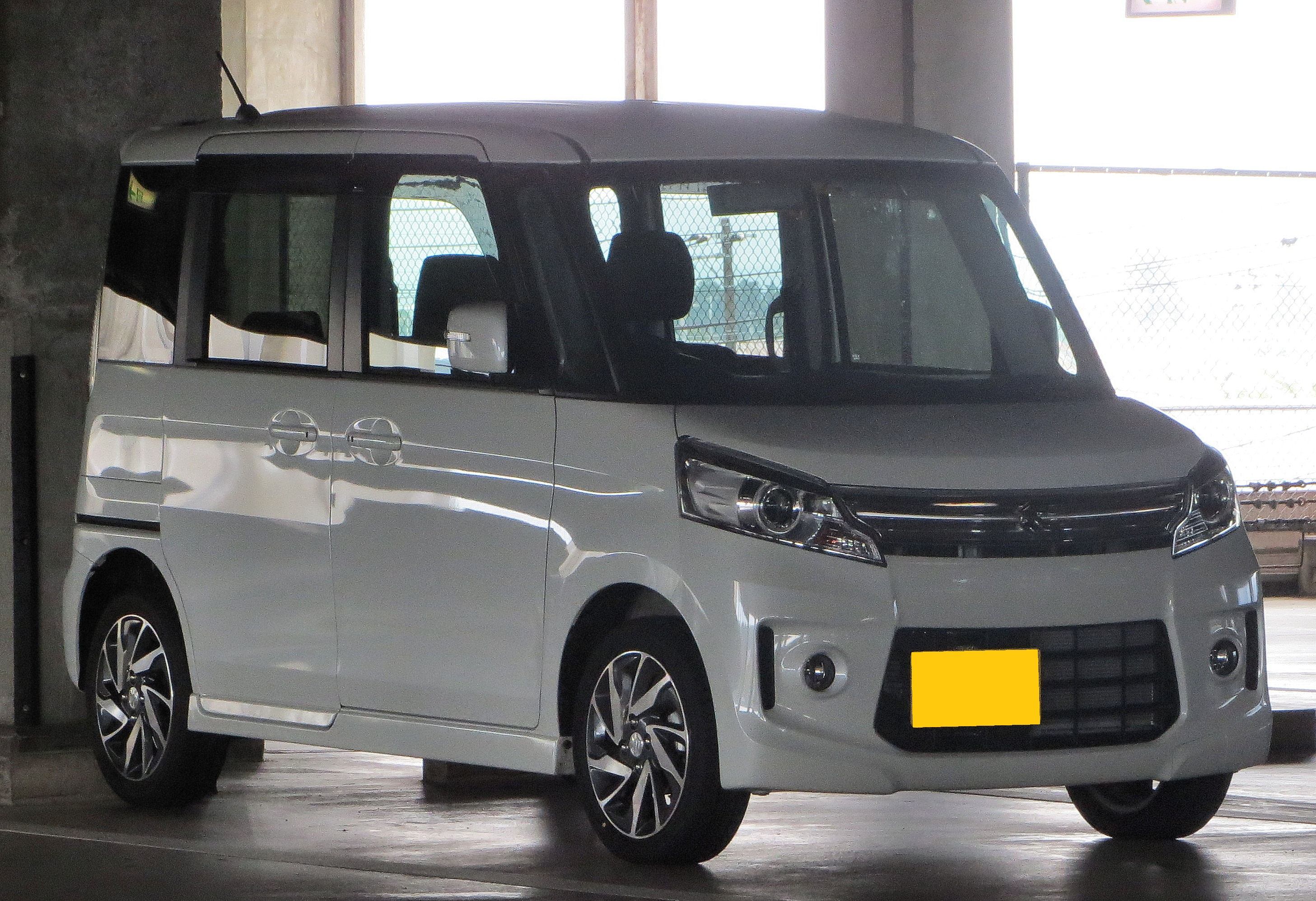 スズキ スペーシア カスタム TS